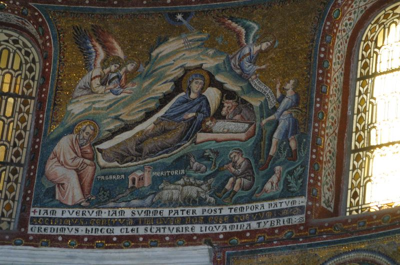 Jesu fødsel, Santa Maria in Trastevere, Roma